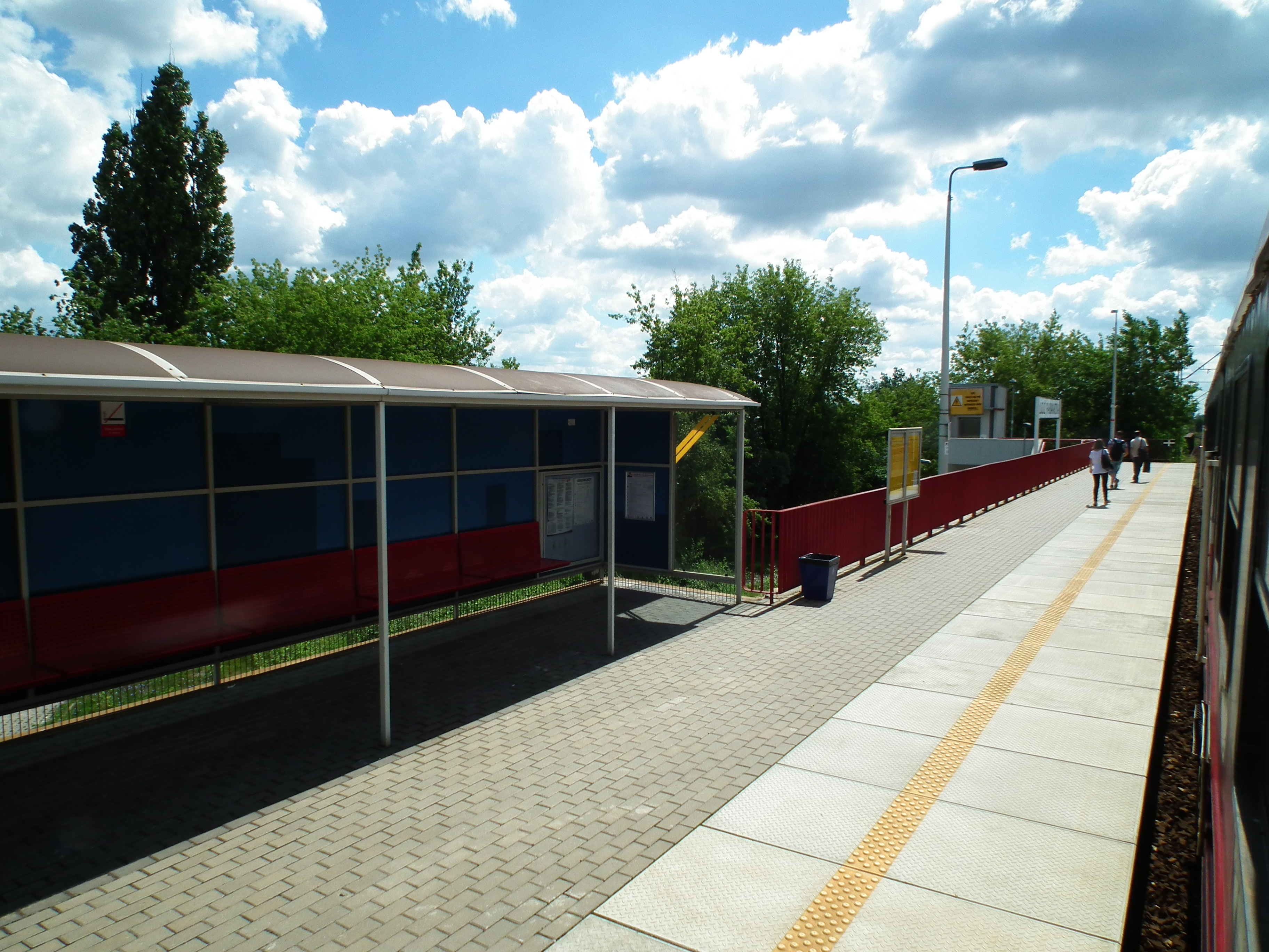 Przystanek kolejowy Łódź Pabianicka.